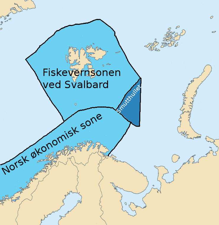 Smutthullet i Barentshavet.